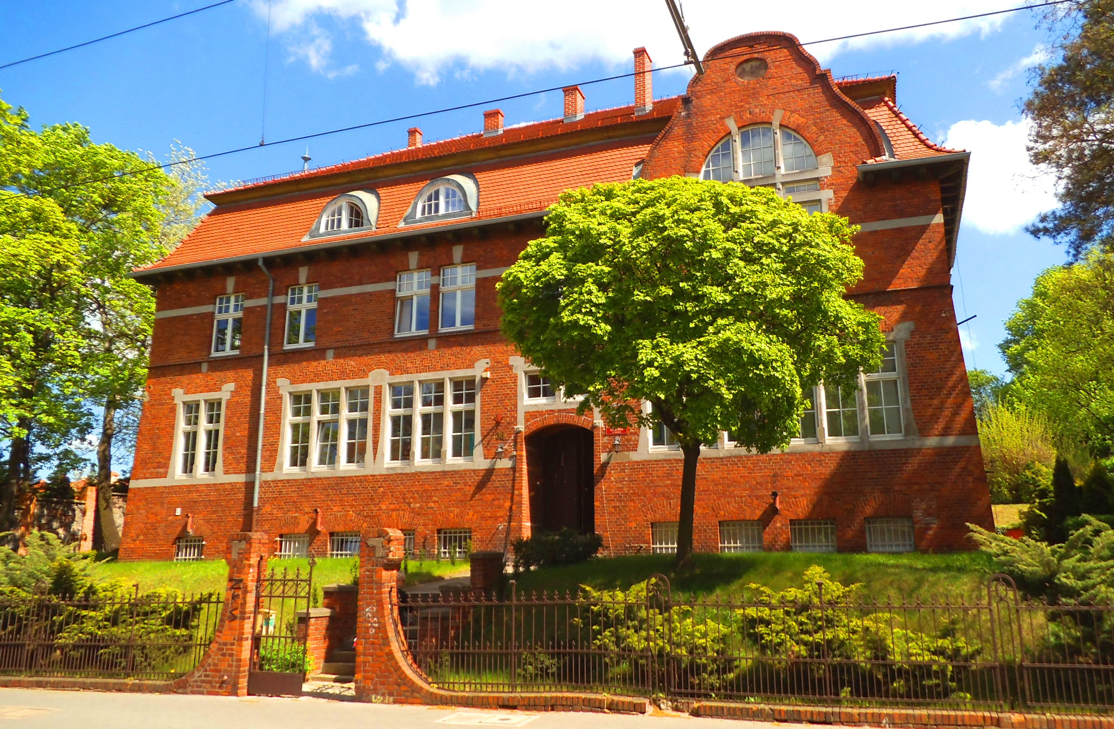 Budynek przy ul. Sienkiewicza 38 w Toruniu